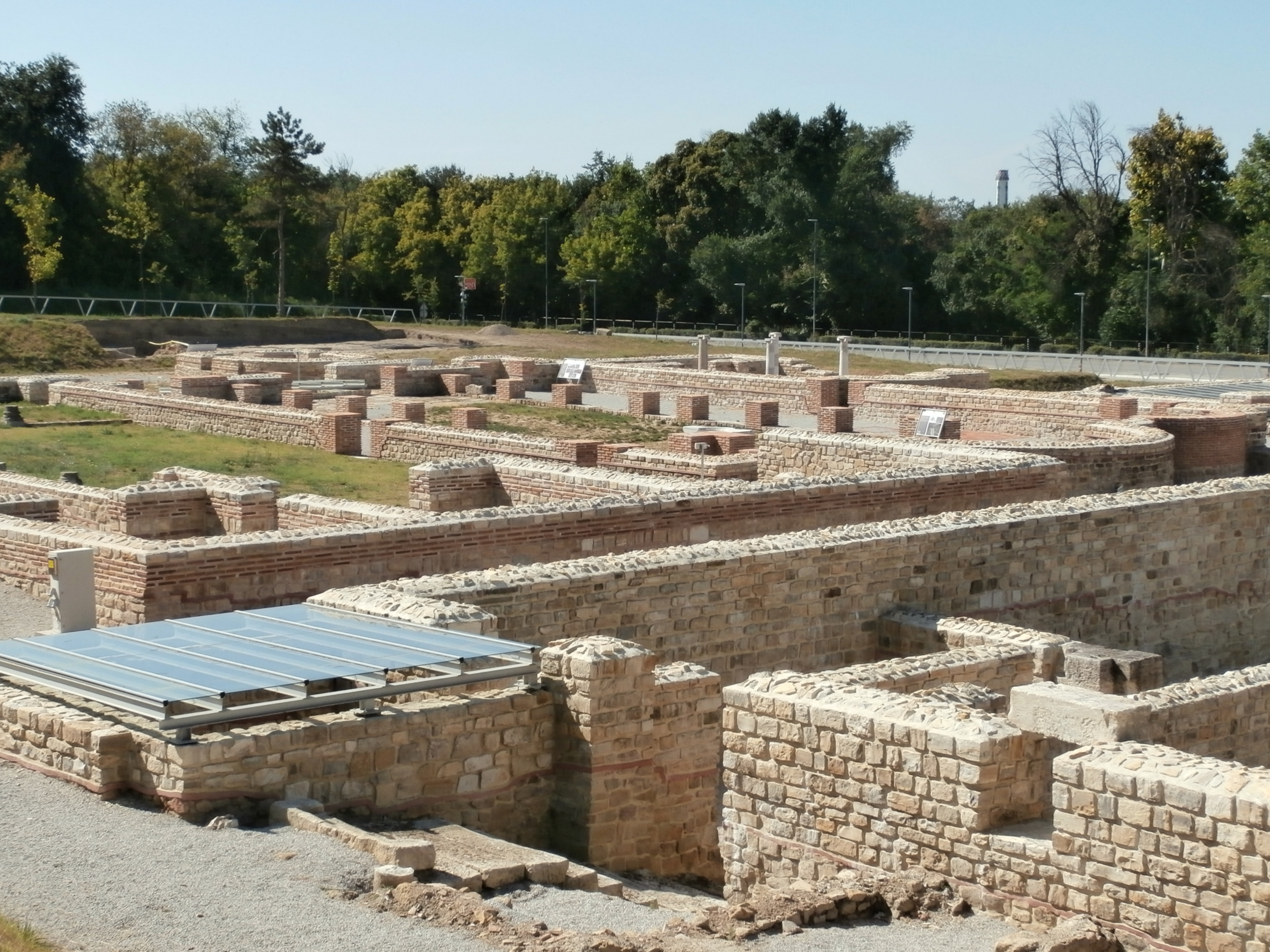 Римският град Нове